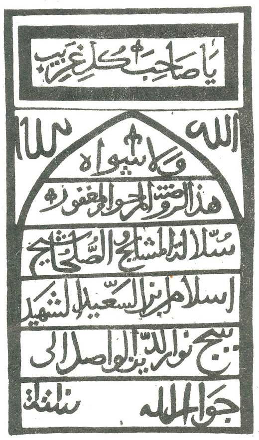 Xanağa piri. Sol tərəfdəki başdaşı